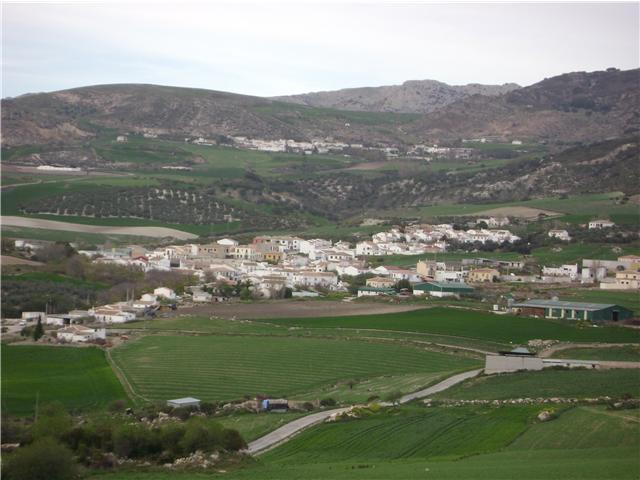 Vista de la localidad de La Joya, en el municipio de Antequera, viéndose parte del macizo del Torcal al fondo.